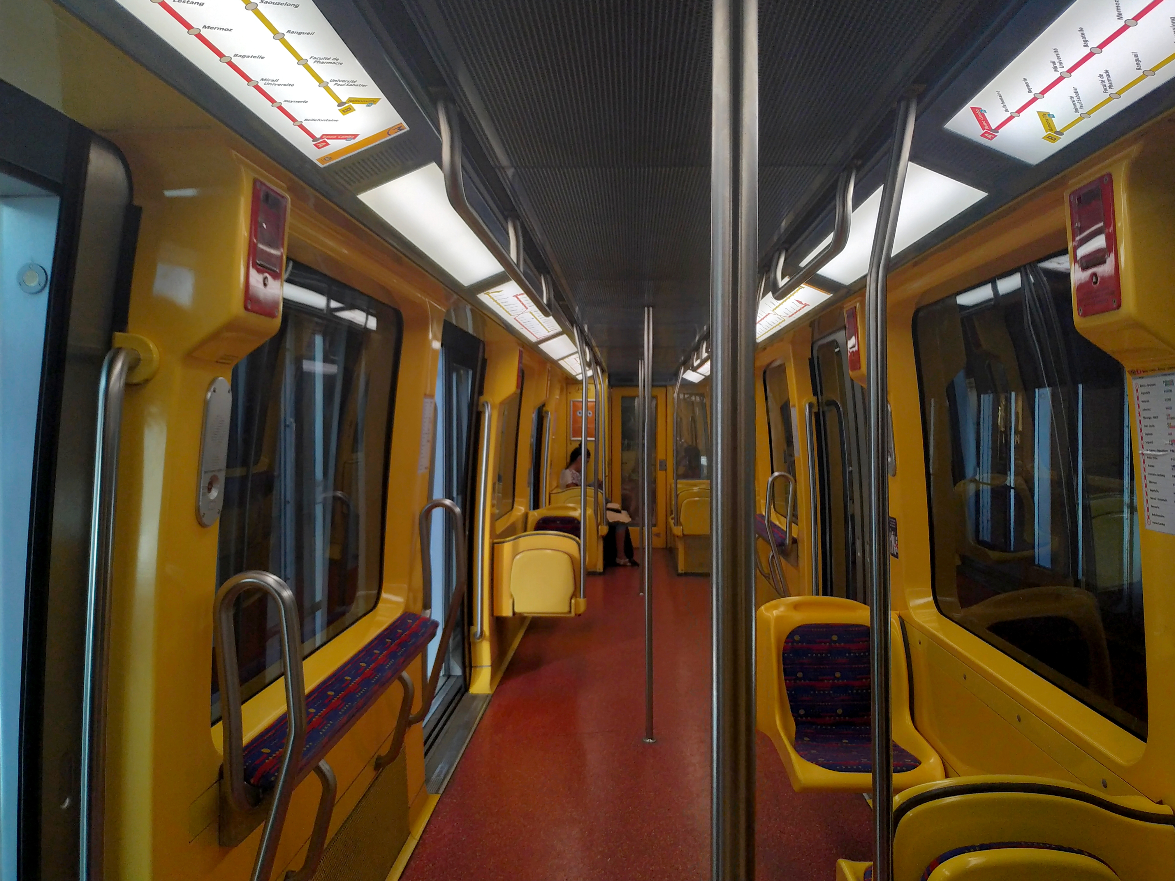 VAL 208 du métro toulousain avec l'éclairage rénové